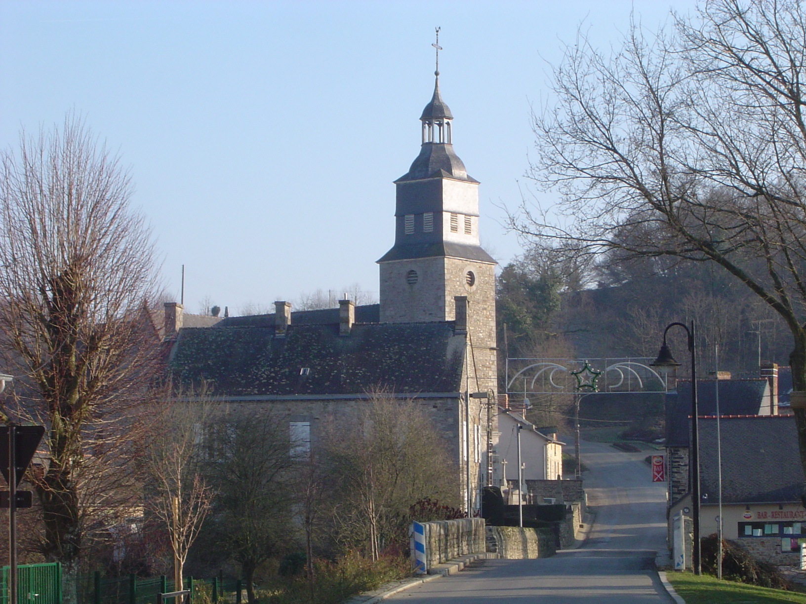 L'église Saint-Pierre-Saint-Paul et le presbytère. En premier plan, le pont au-dessus de la rivière Pérouse.